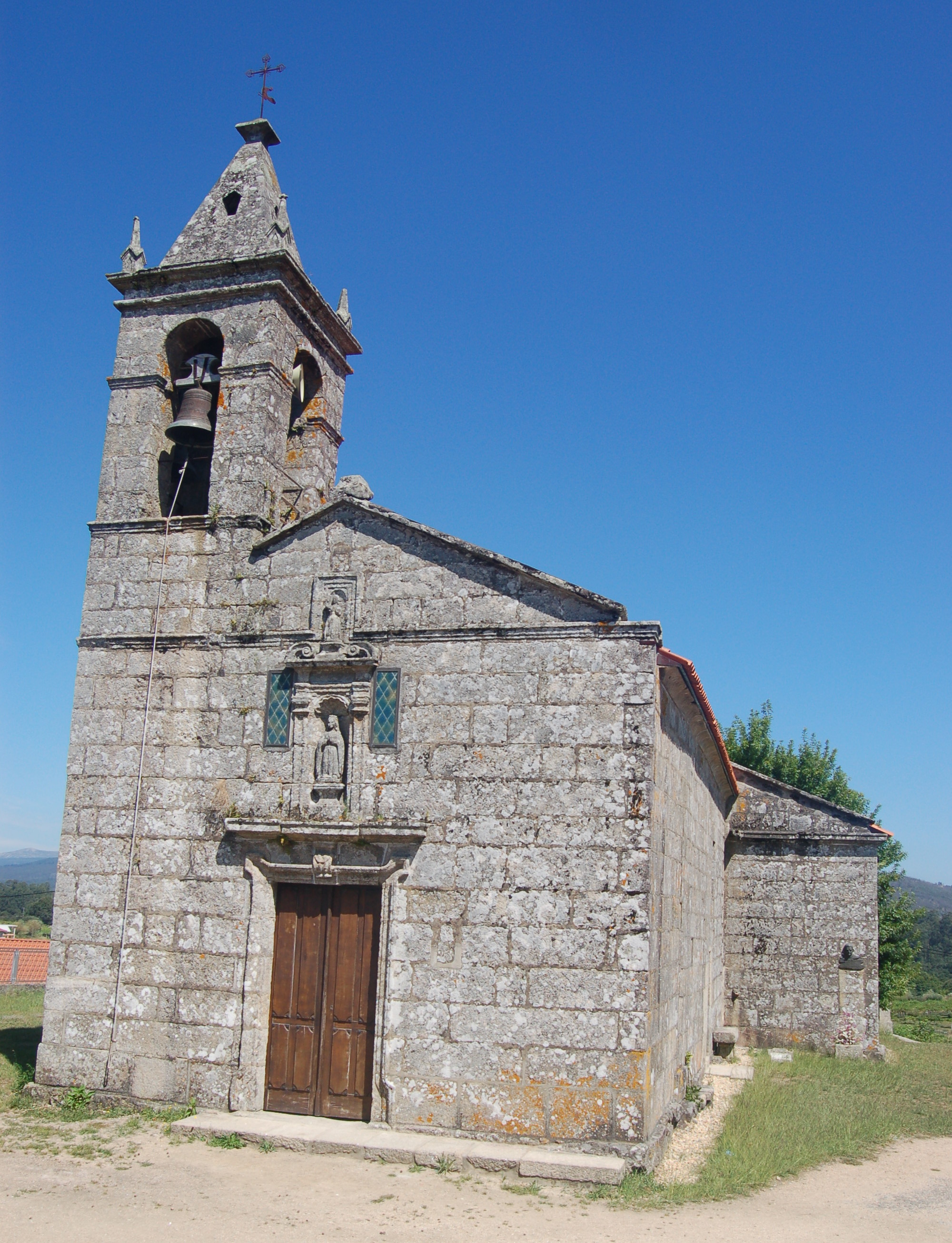 Igrexa parroquial de Santa María de Curro (Barro)